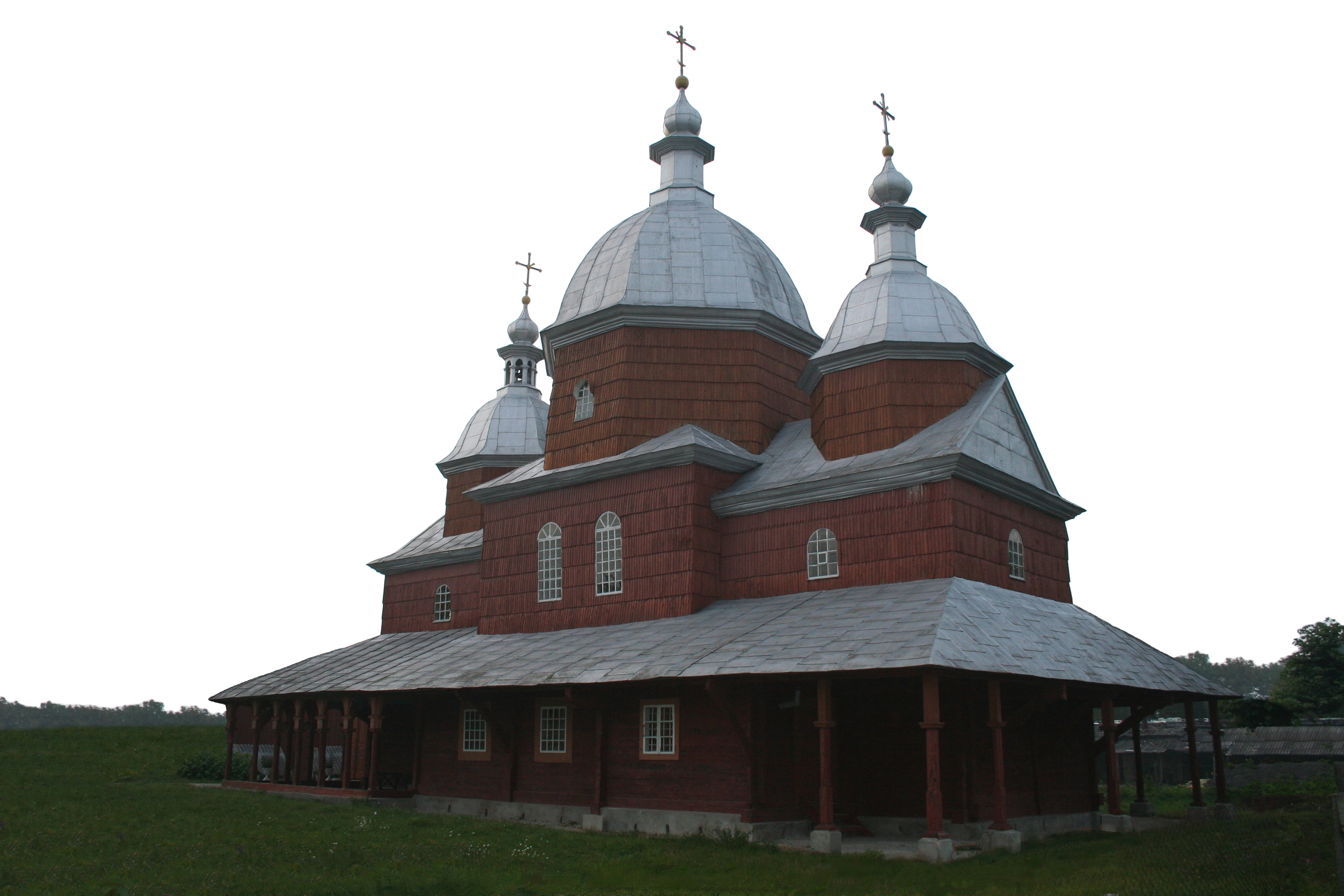 ц-ва Архистратига Михаїла